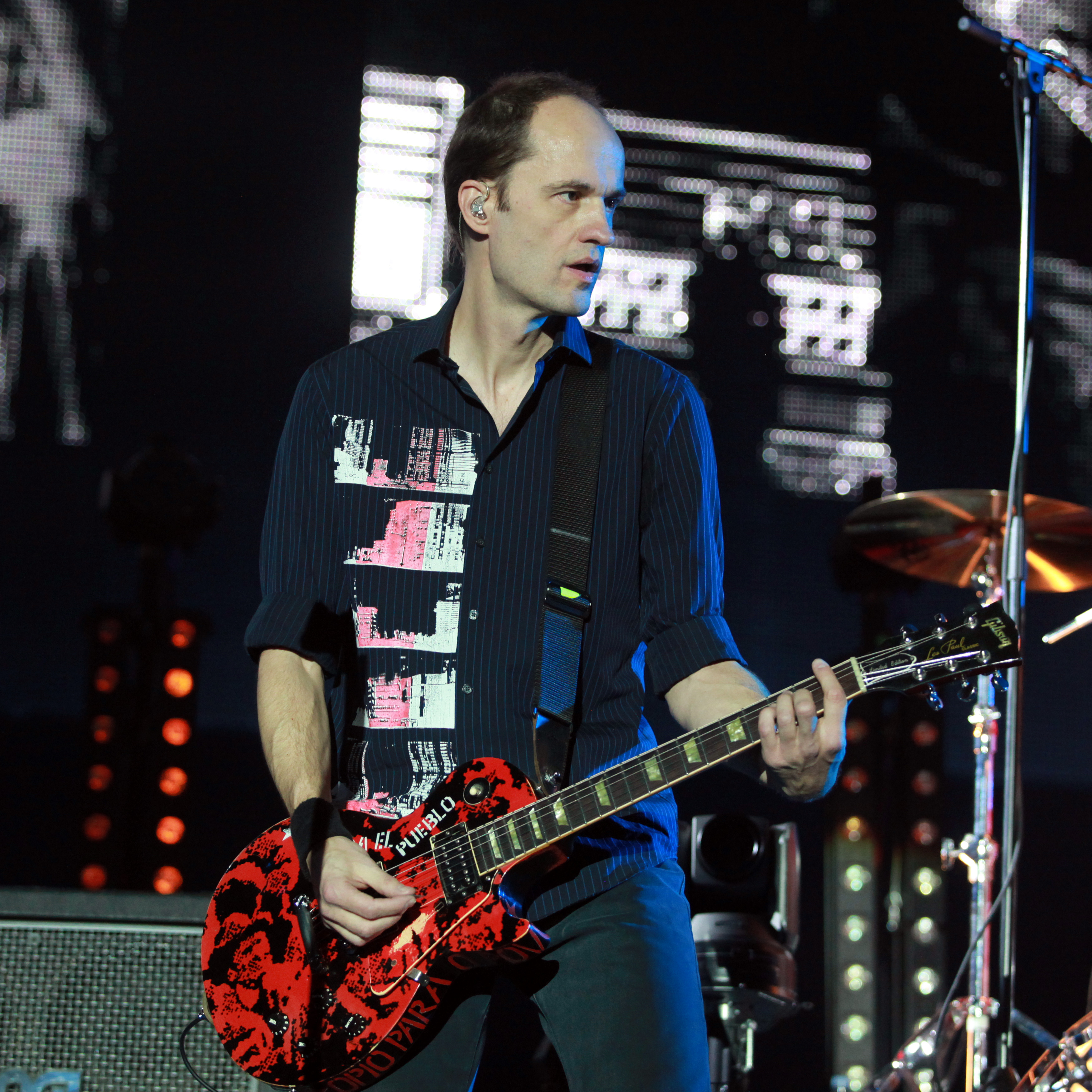 Michael Breitkopf, genannt Breiti, von den Toten Hosen am 15. Dezember 2012 in der SAP Arena in Mannheim.